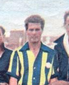 Antonio Inveninato, futbolista argentino de las décadas de 1940 y 1950.